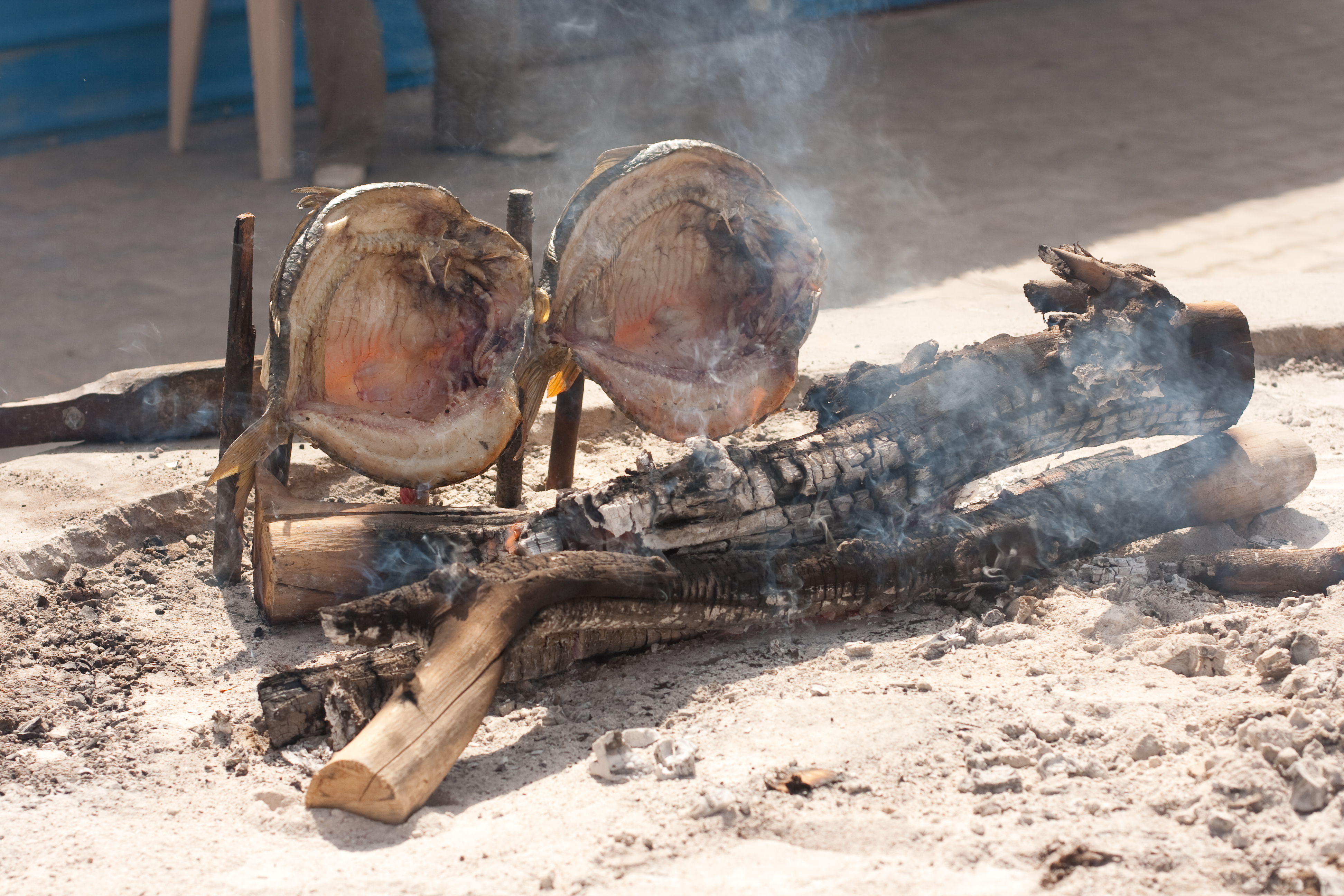 Grilling masgouf